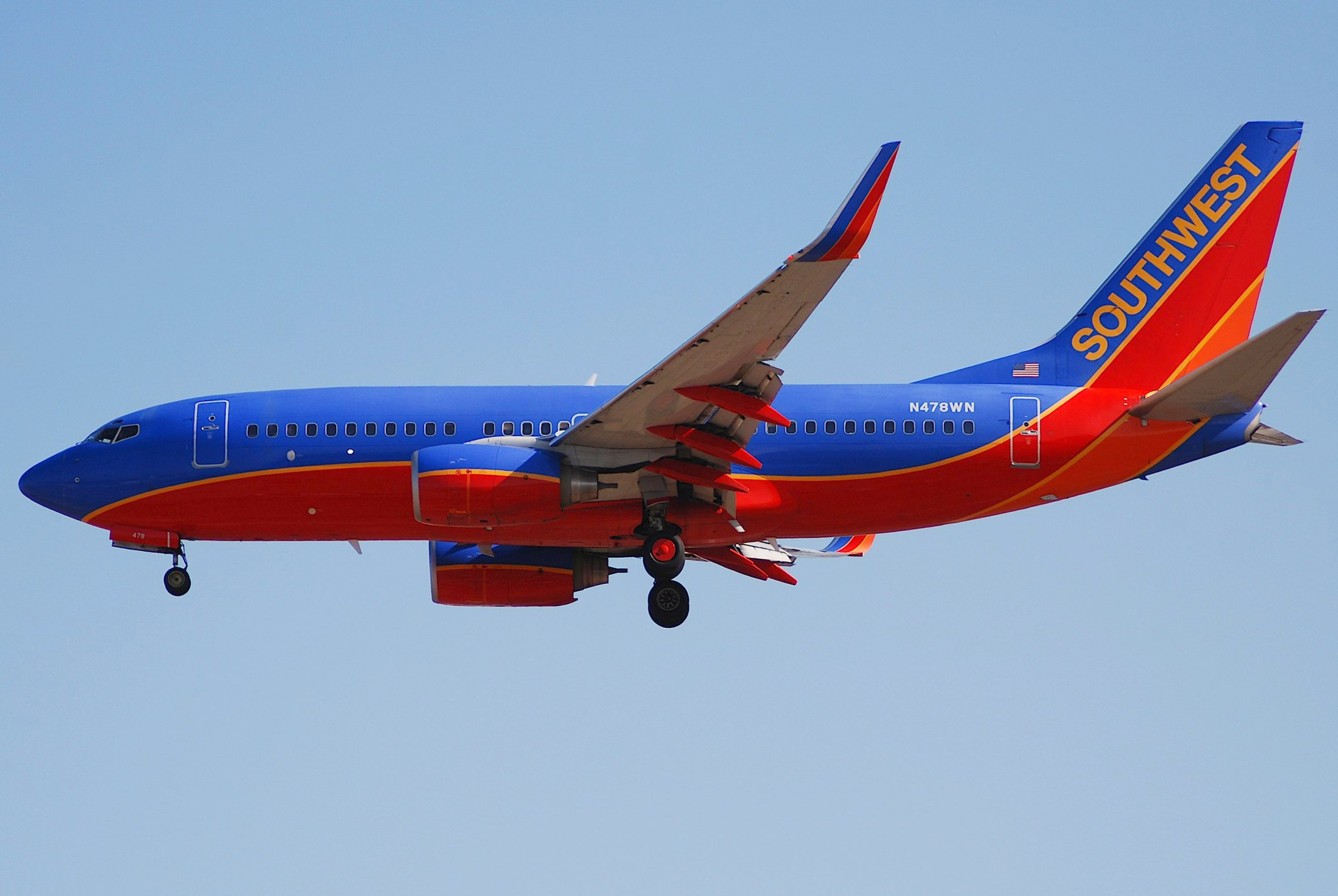 Southwest Airlines Boeing 737-700; N478WN@LAX;18.04.2007/463eu